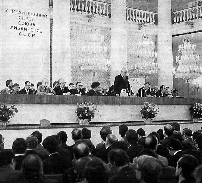 Учредительный съезд союза дизайнеров СССР 3 апреля 1987 года в Колонном зале Дома Союзов в Москве